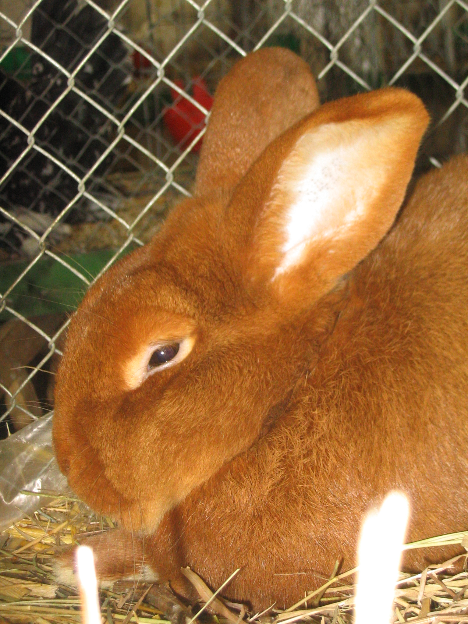 Oryctolagus cuniculus, Hauskaninchen, Domestic Rabbit, Rasse: Roter Neuseeländer Fotografiert: 06.10.2004, Dr. Hagen Graebner